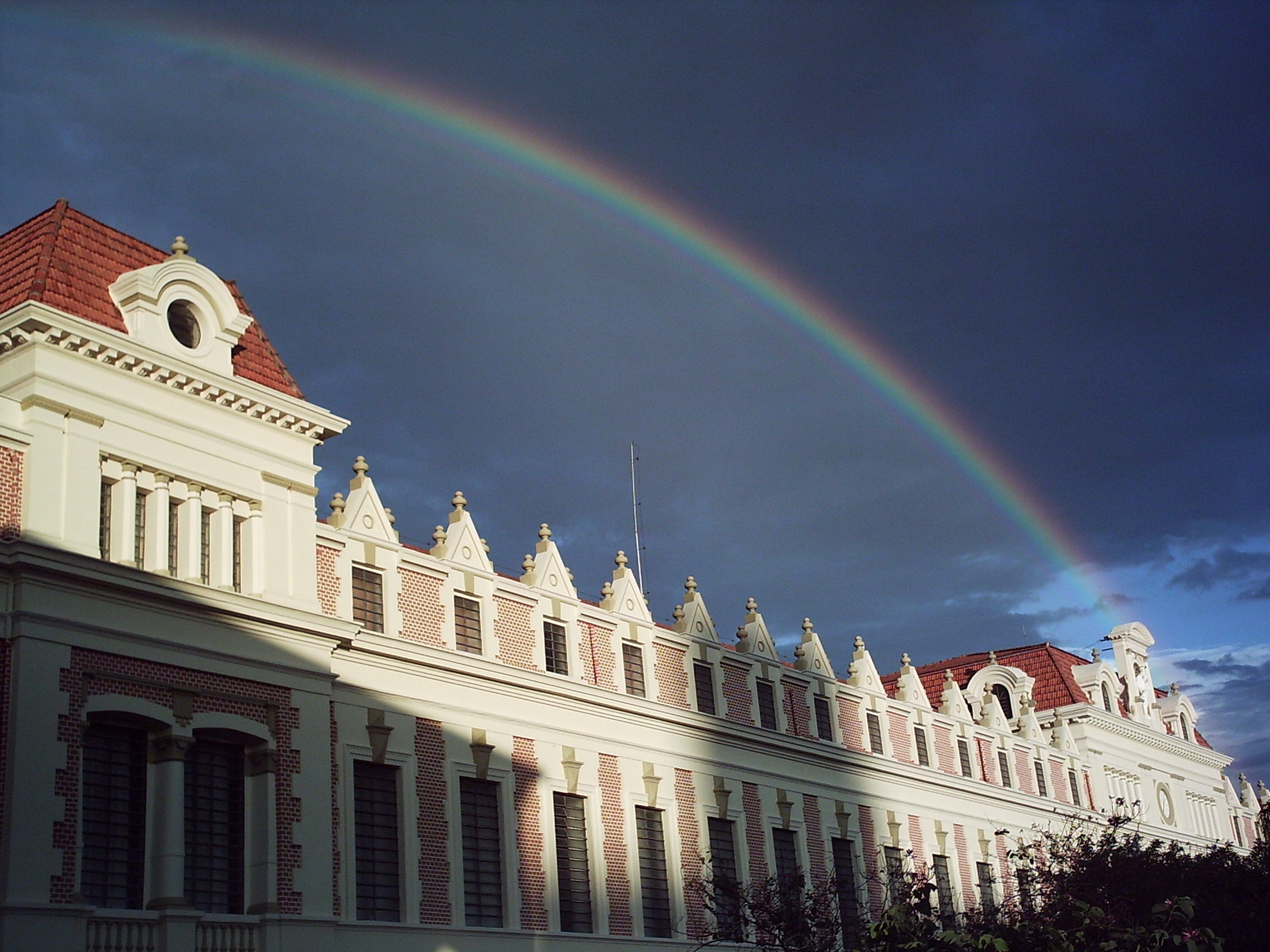 This is a picture of "Colégio Liceu Salesiano Nossa Senhora Auxiliadora" at Campinas (São Paulo - Brazil).